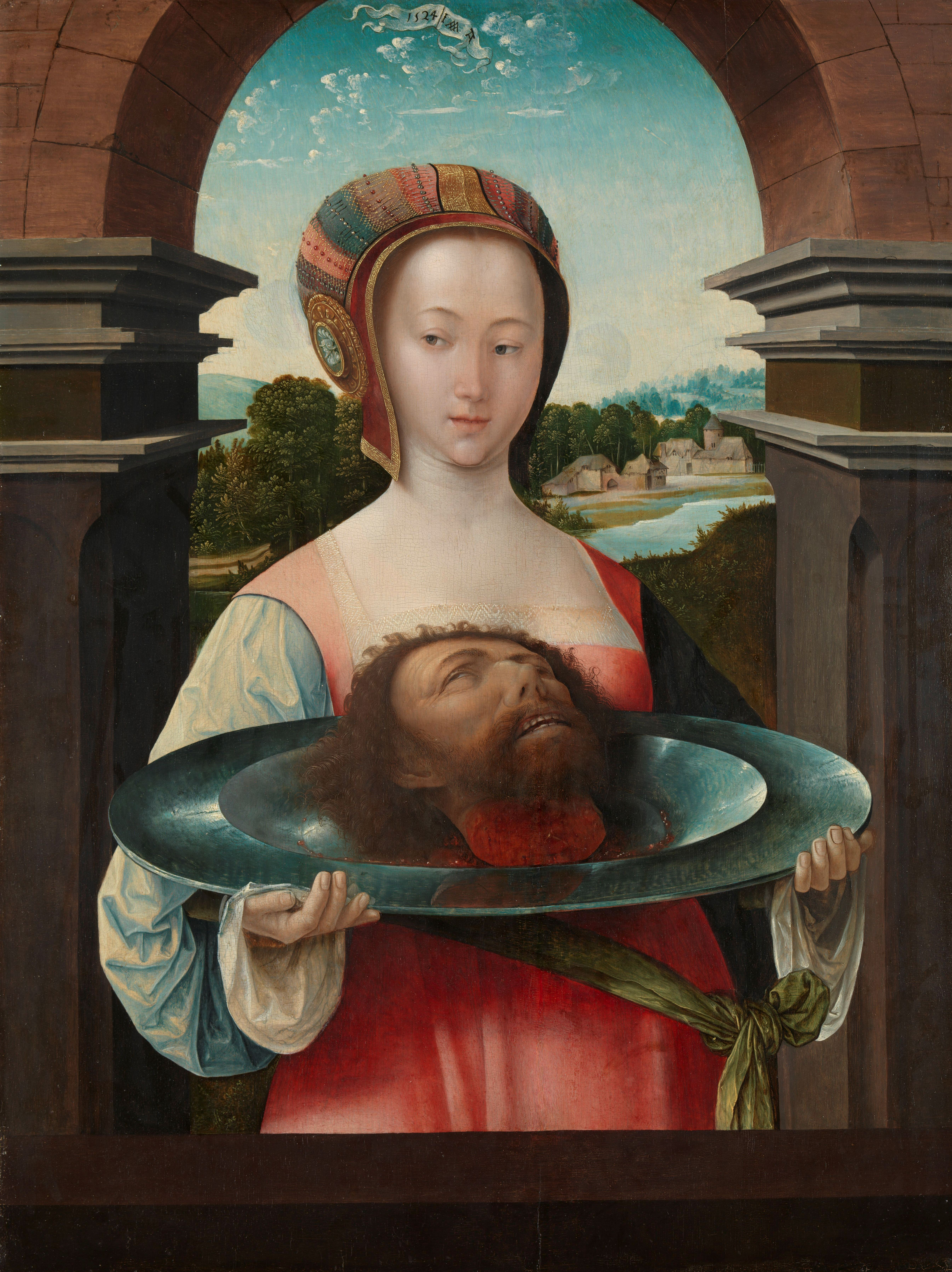 Salomé met het hoofd van Johannes de Doper op een grote ronde tinnen schotel. Staande onder een boog, in de verte een landschap met boerderijen aan een rivier.; Jacob Cornelisz van Oostsanen, alias Jacob War van Amsterdam (ca. 1472/77– in of vóór 1533), Amsterdam, 1524, olieverf op paneel